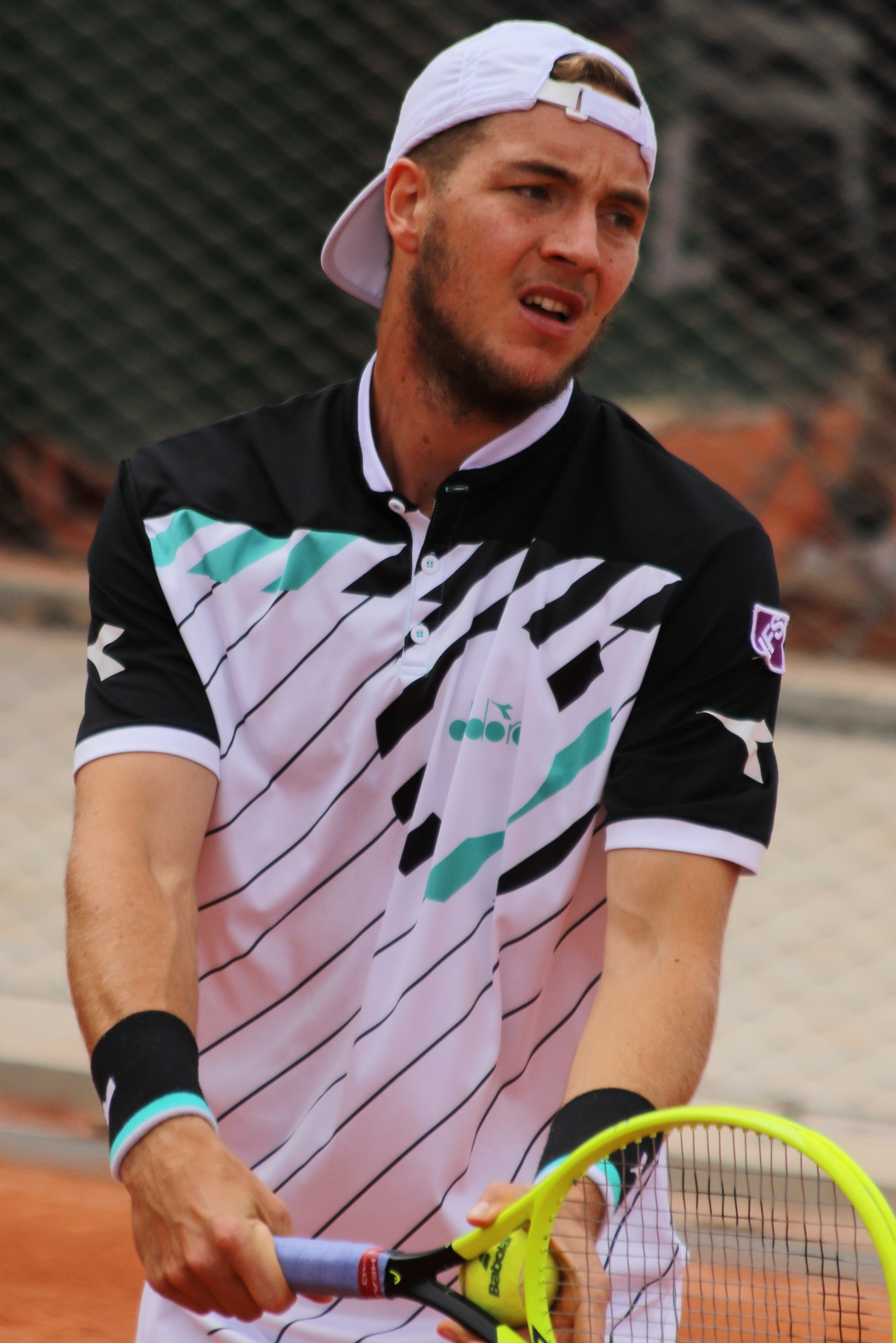 Struff RG19 (51)